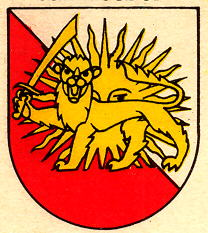 Wappen von Chesalles-sur-Moudon Kanton Waadt Schweiz